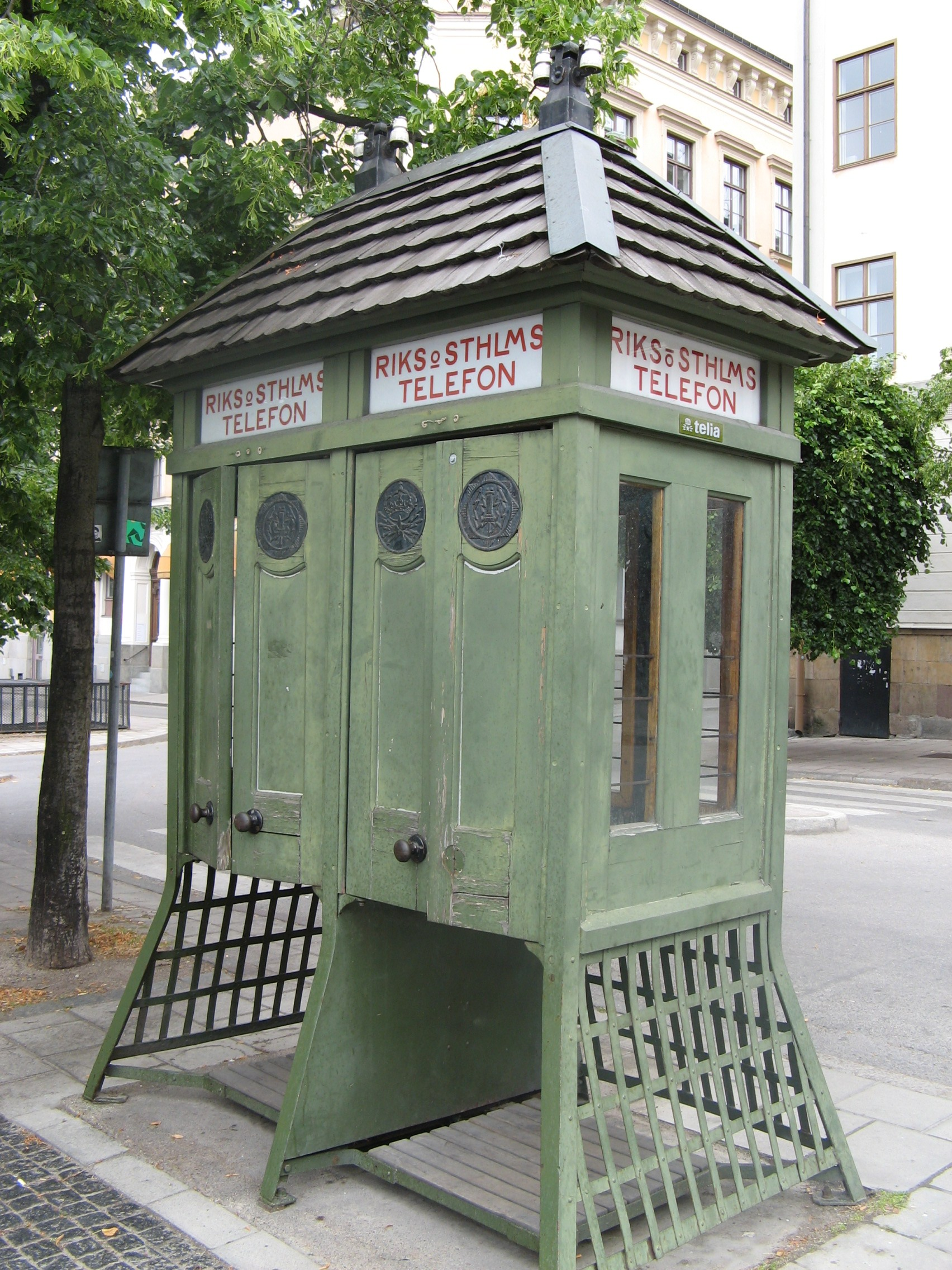 Cabine téléphonique, Gamla Stan, Stockholm, Suède